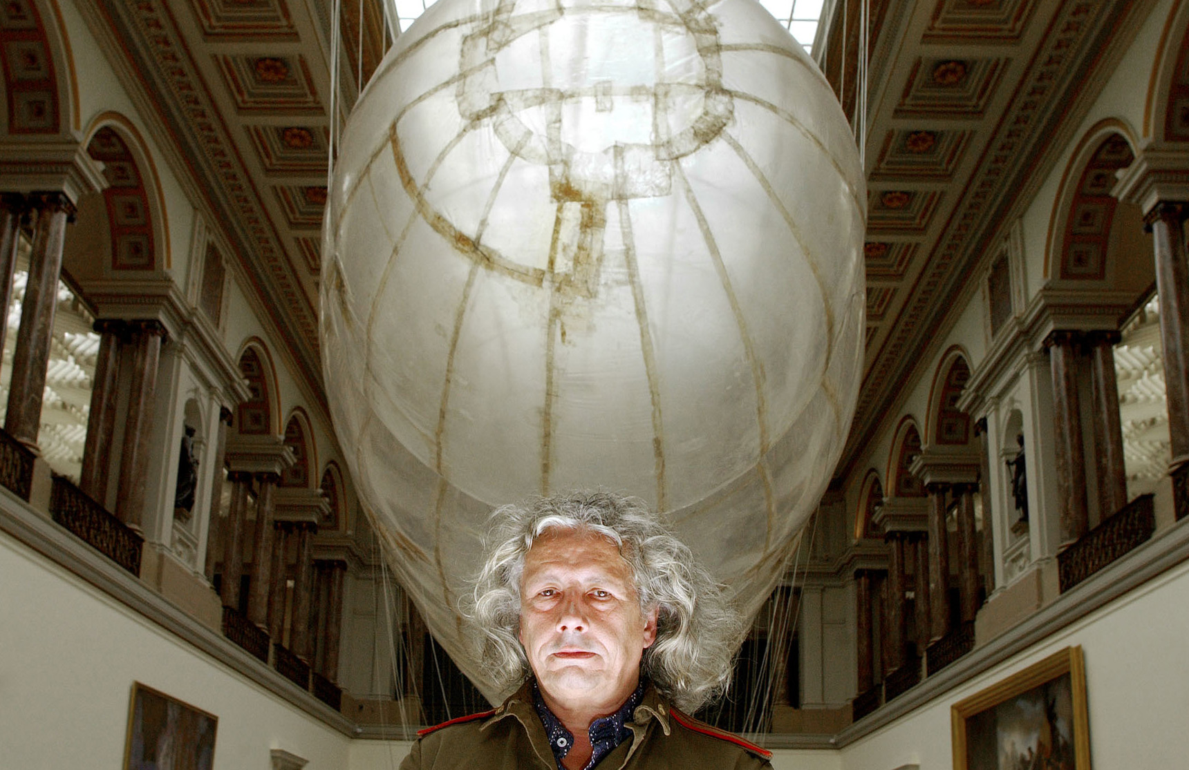 Panamarenko met op de achtergrond zijn Aeromodeller.